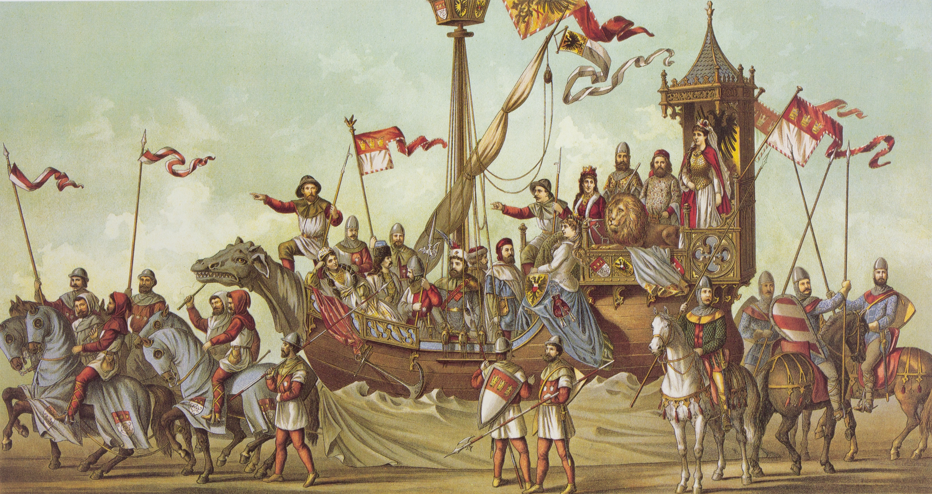 Tony Avenarius: Historischer Festzug veranstaltet bei der Feier der Vollendung des Kölner Doms am 18. October 1880. Tafel XV